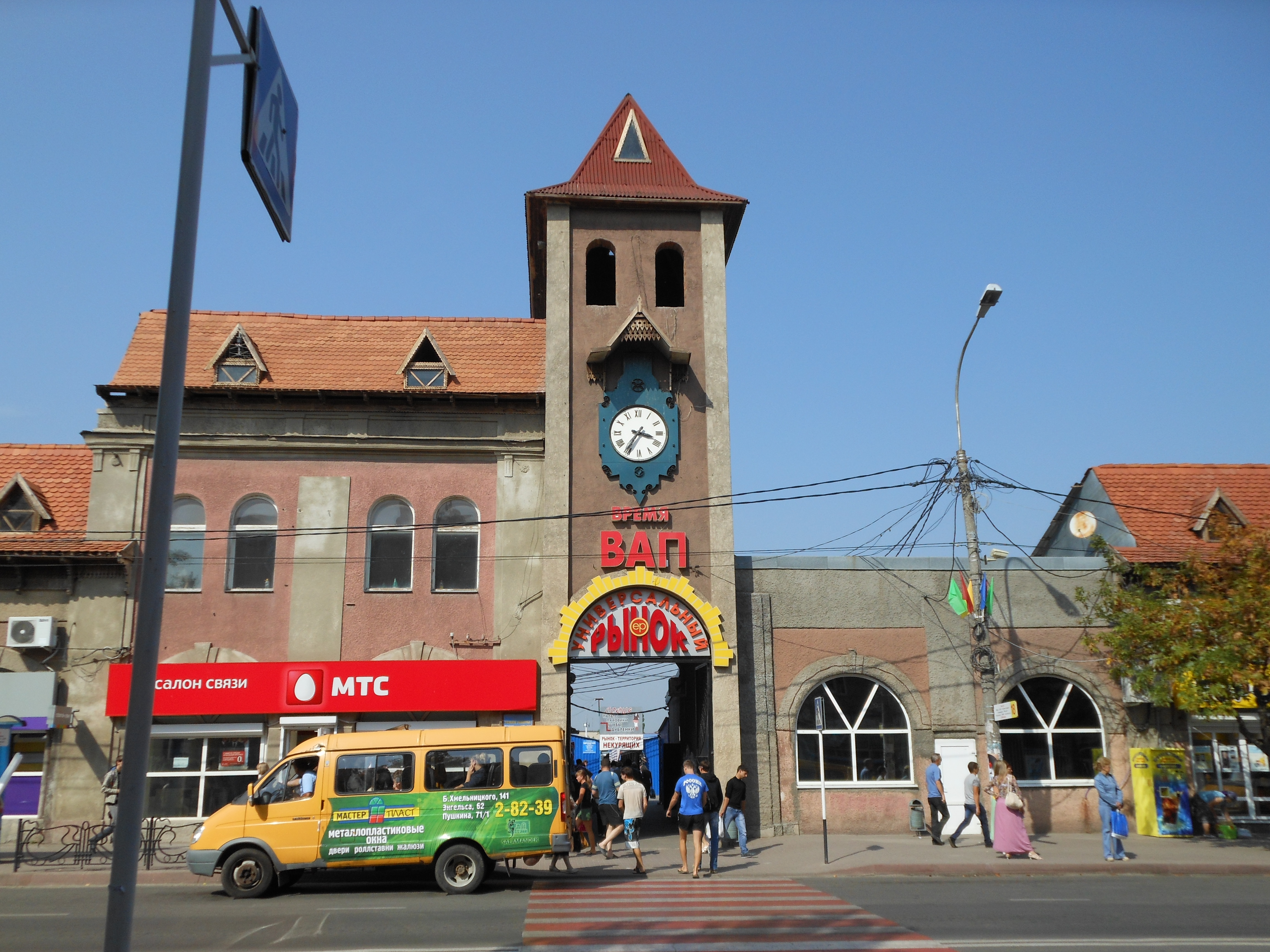 Россия, Ейск, Гостинный двор, Центр, Сейчас - торговый центр, рынок. Сентябрь 2012г